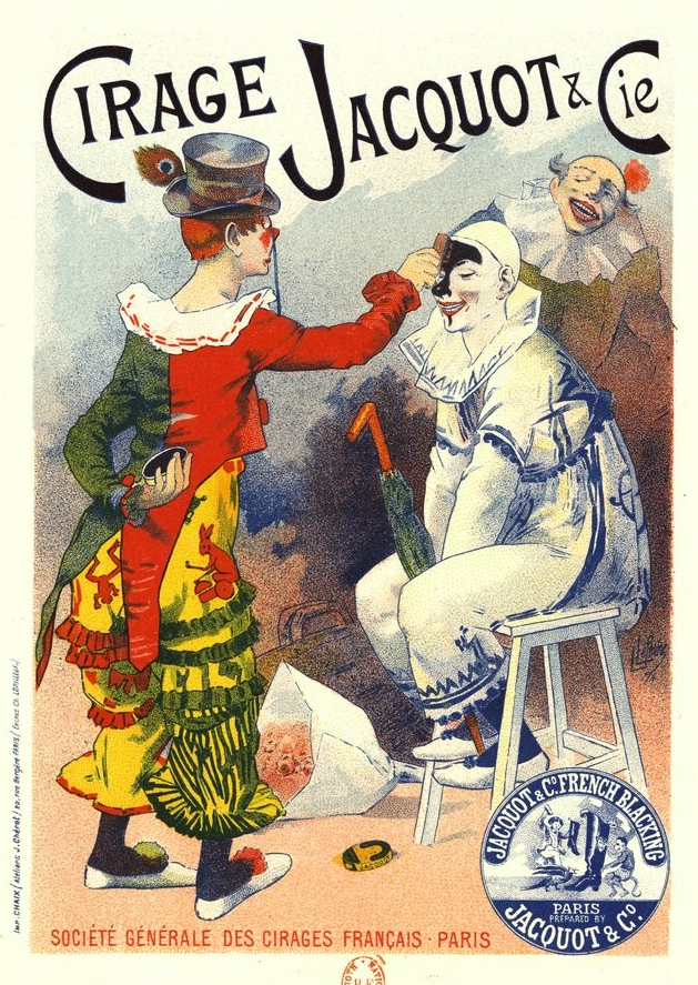 Fac similé Lithographic Poster Cirage Jacquot & Cie, designed by Lucien Lefèvre, printed in Paris, Chaix [Jules Chéret].